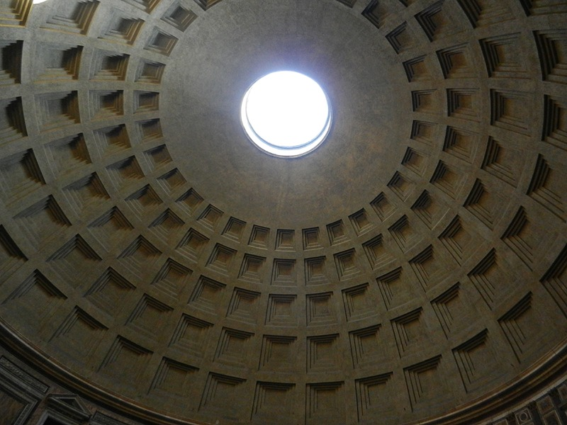 Roma - La cupola del Pantheon vista dall'interno